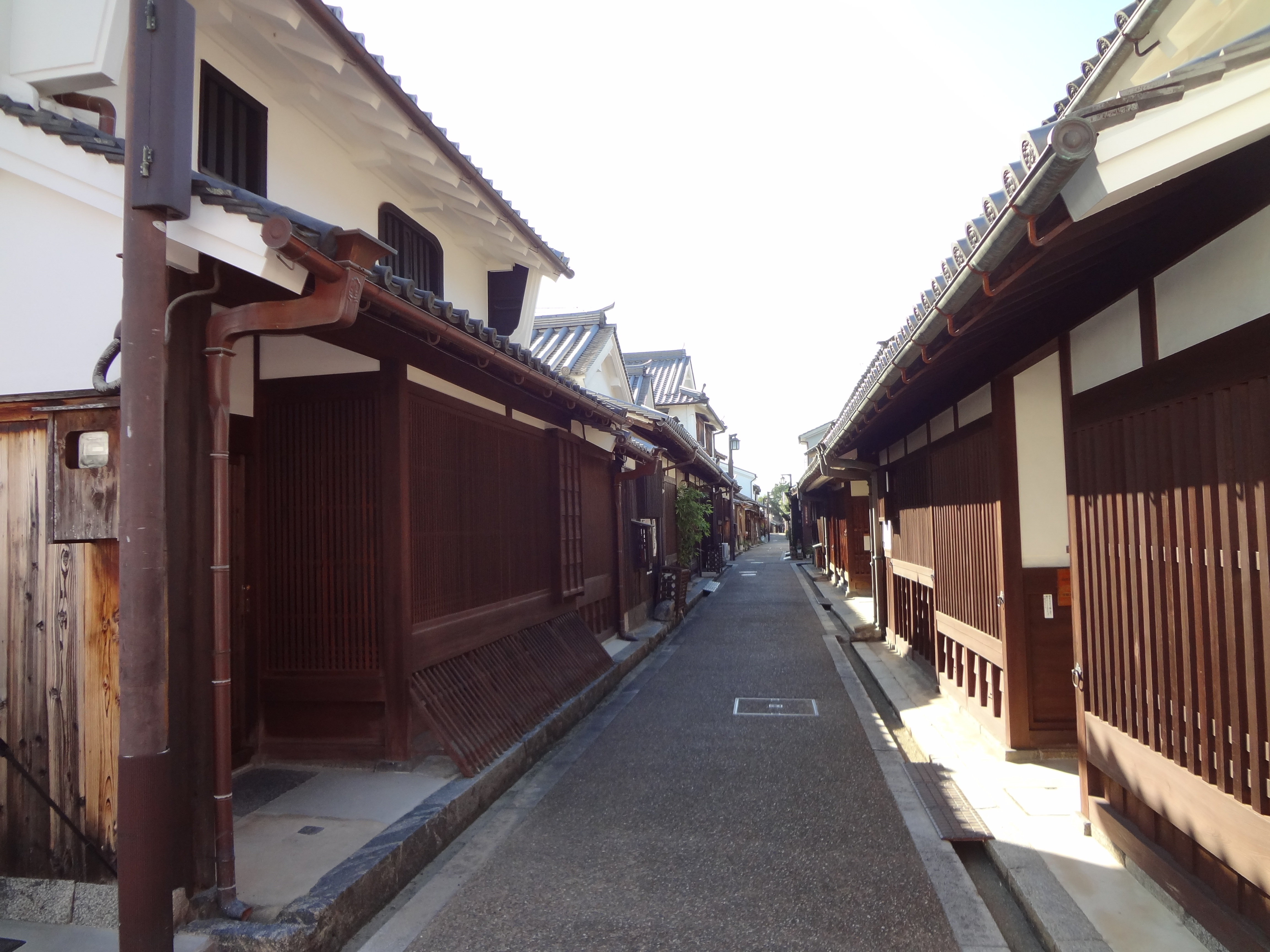 今井町は、奈良県橿原市の北西方に位置する東西600m、南北310mの区域。重要伝統的建造物群保存地区に選定されている。